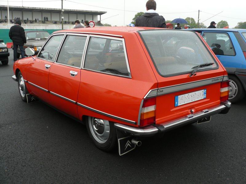 Photo prise en avril 2012 à Montlhery